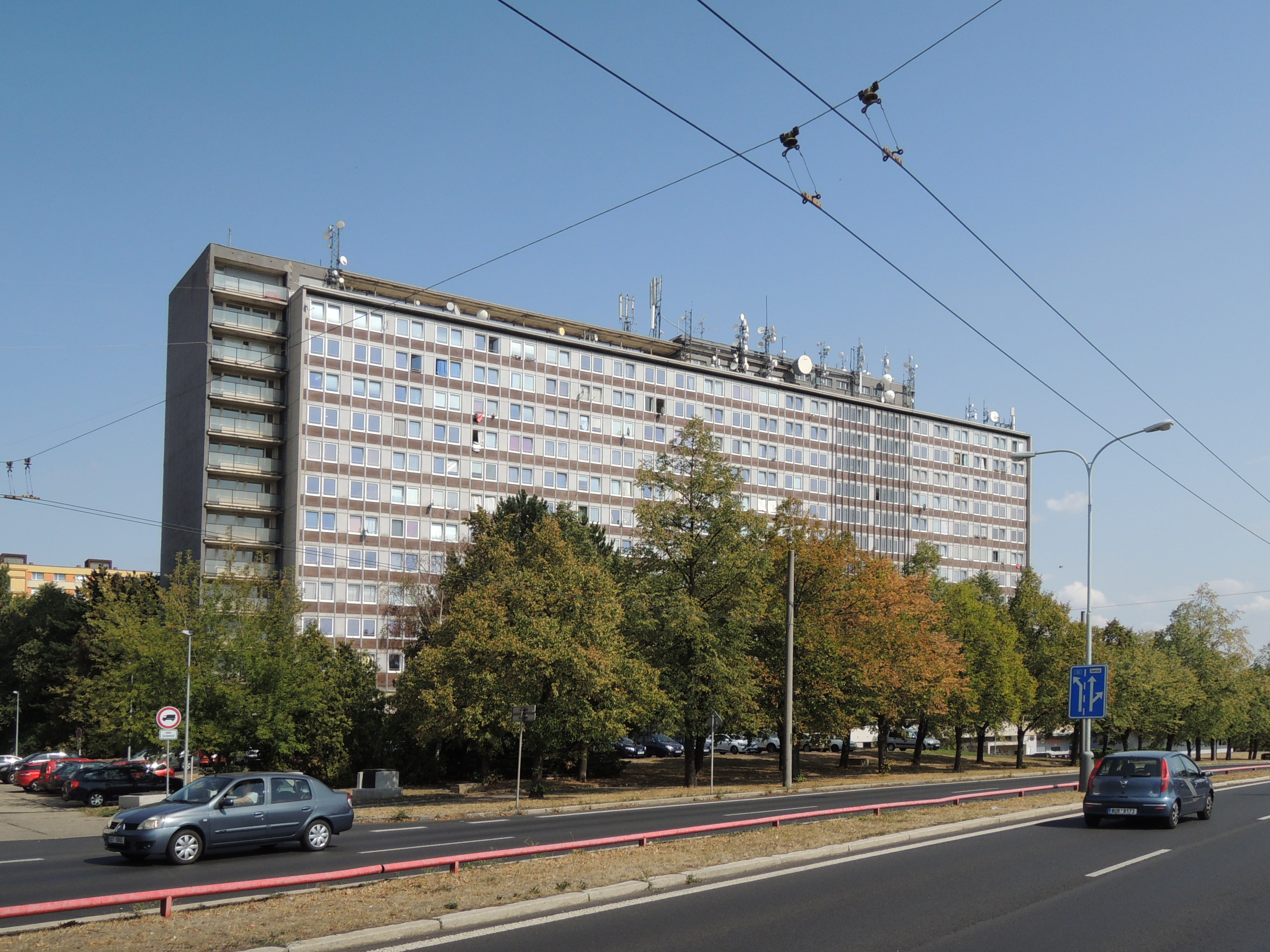 Hotelový dům na Severní Terase